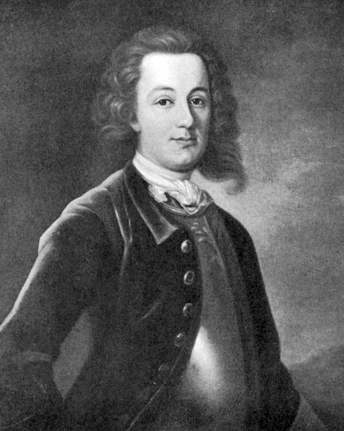 Bengt Johansson Ribbing (1686–1741).